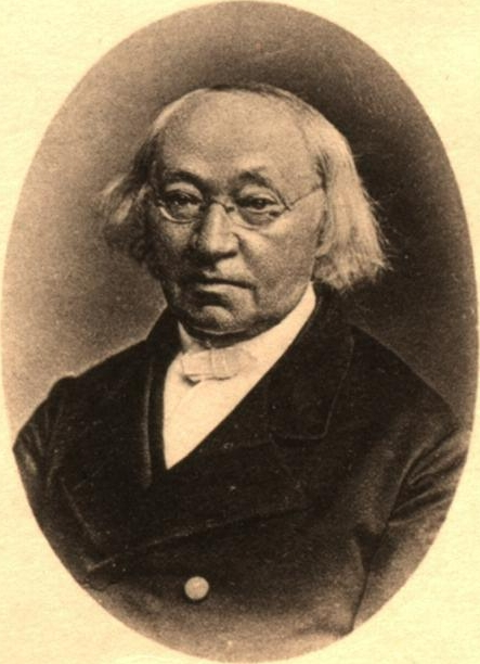 Porträtfotografie von Albert von Hauber.